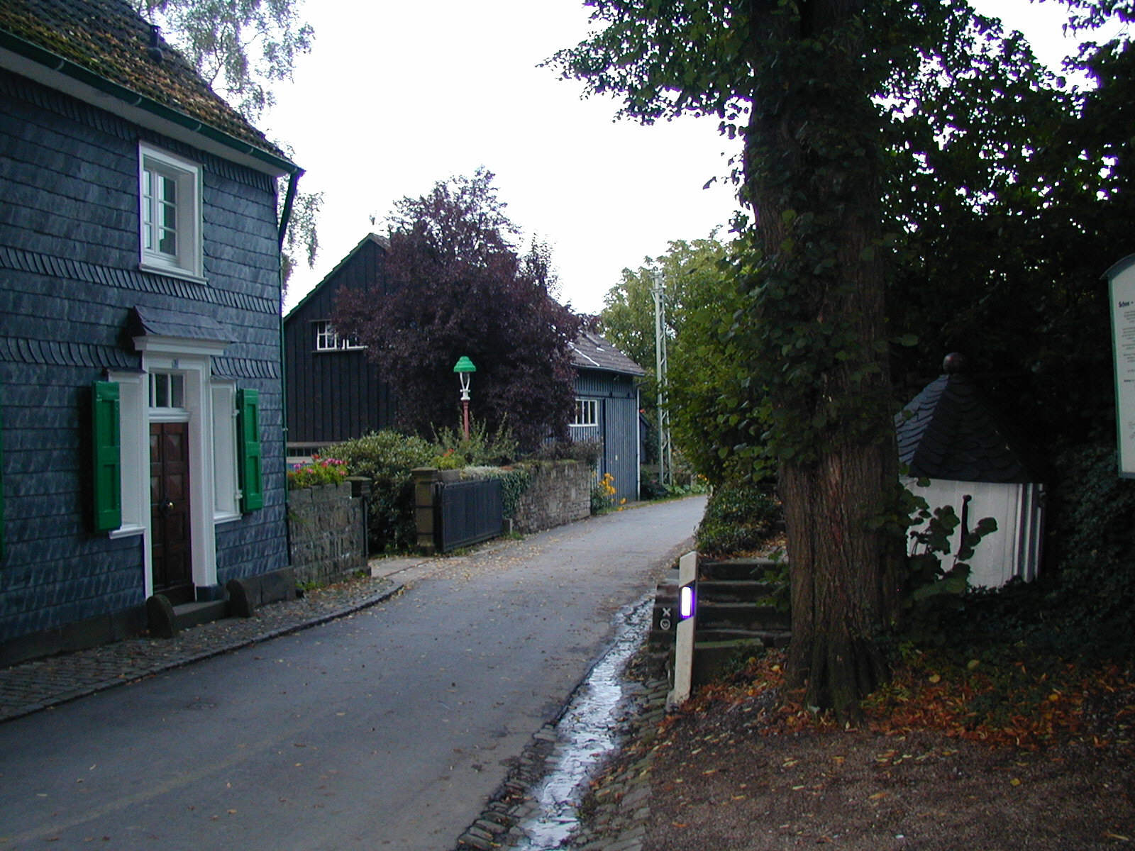 Ortschaft Alter Schee in Sprockhövel